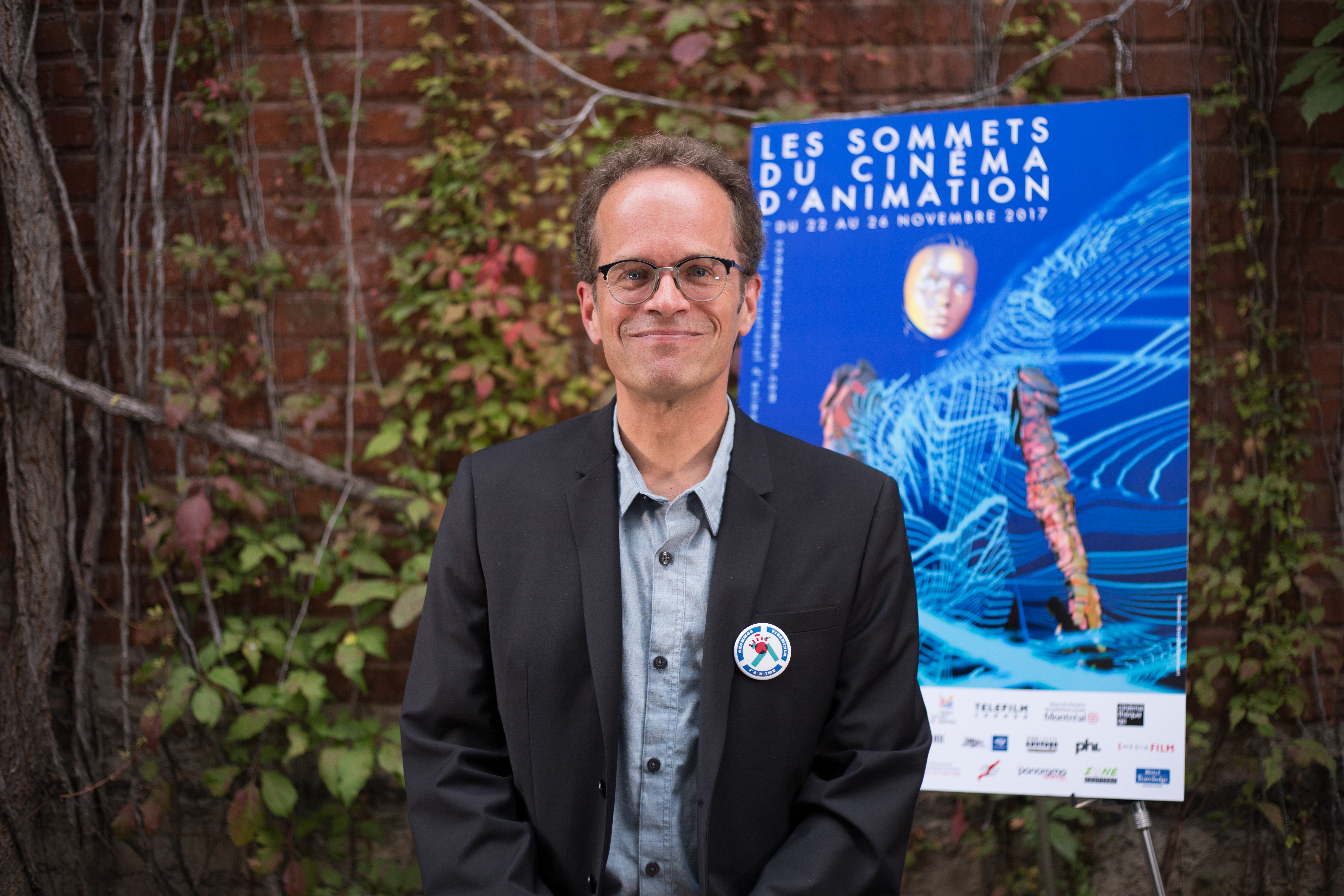 Portrait réalisé dans le cadre du 5 à 7 des Sommets du cinéma d’animation.